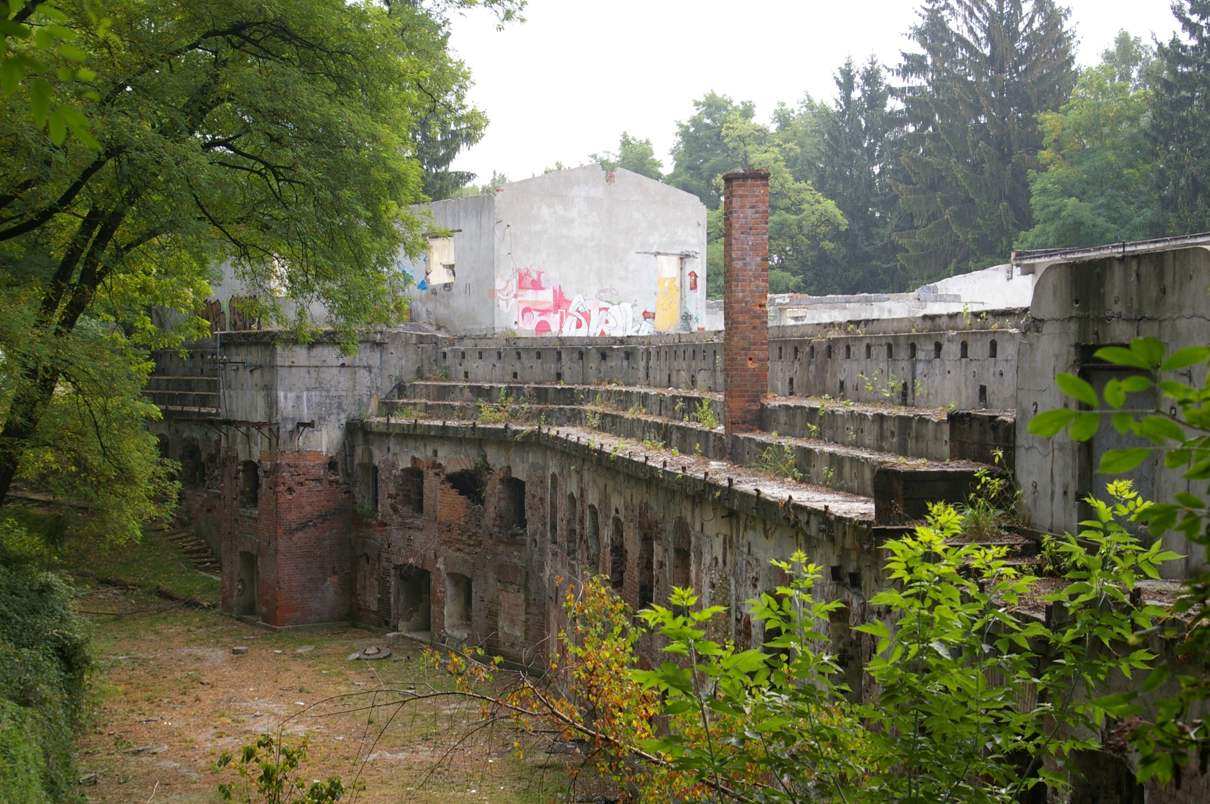 Fort 52a Łapianka (koszary szyjowe), Kraków